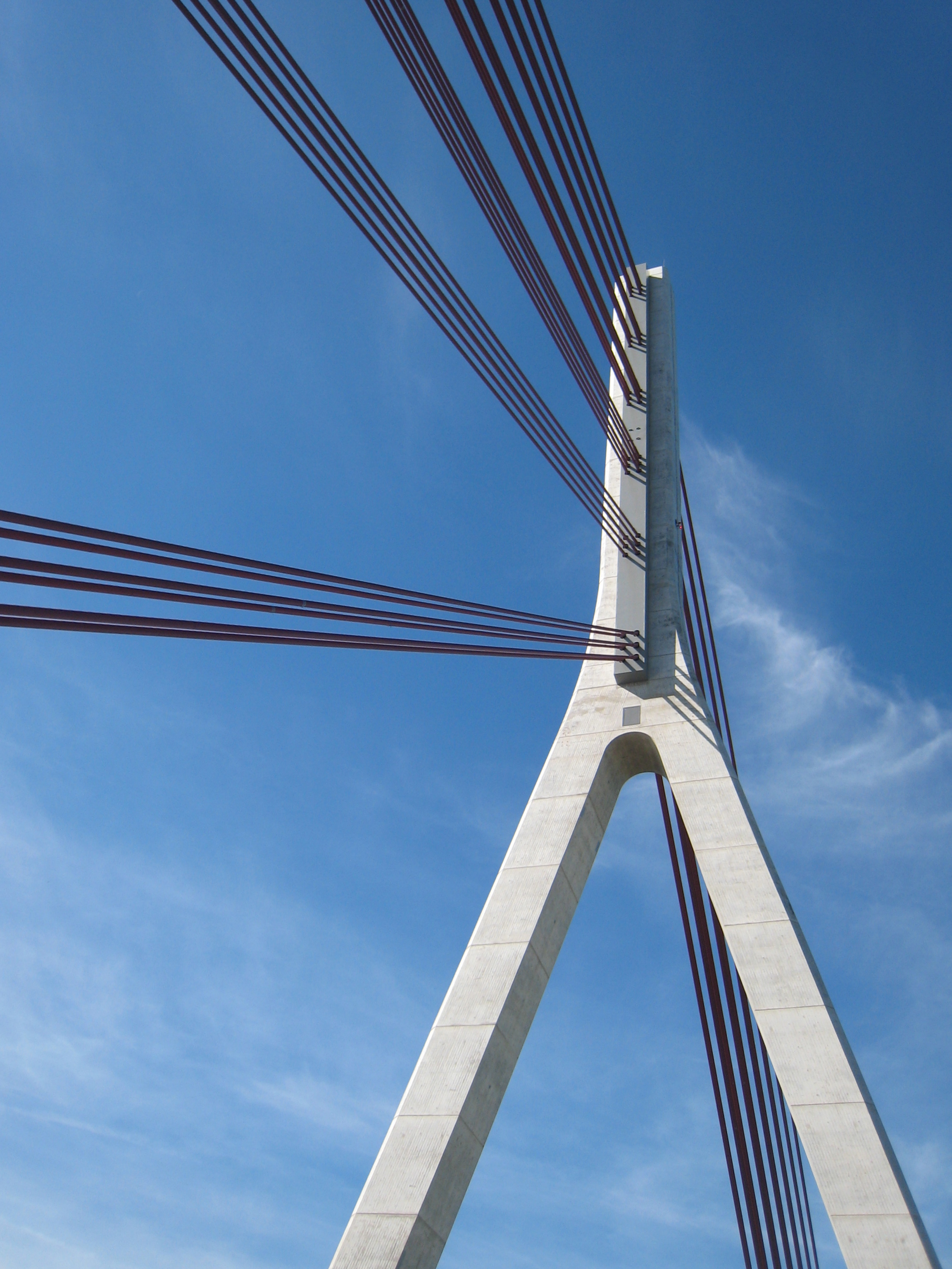 Pylon der Niederrheinbrücke Wesel